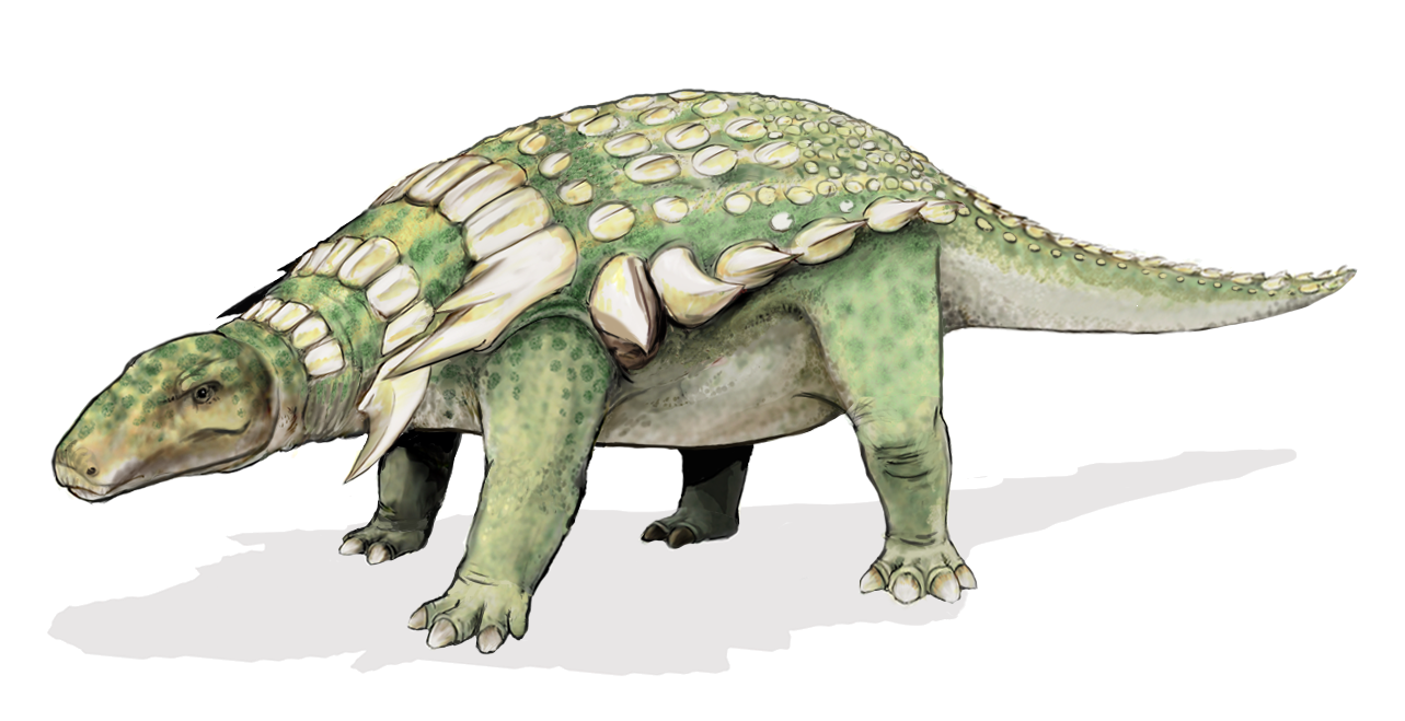 Edmontonia rugosidens.